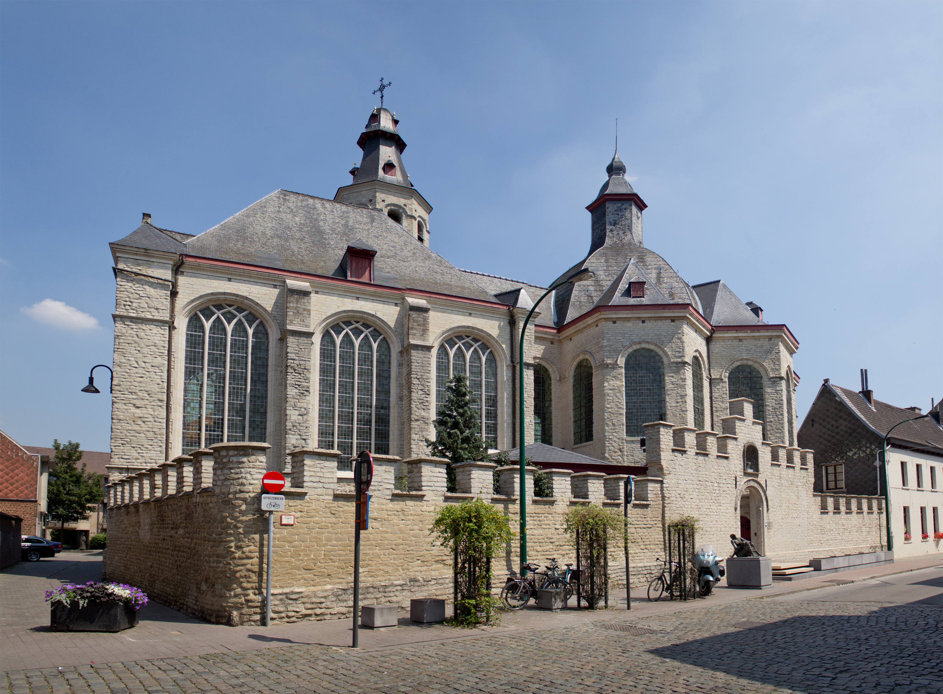 Karmelietessenklooster Onze-Lieve-Vrouw ten Troost, Vilvoorde.